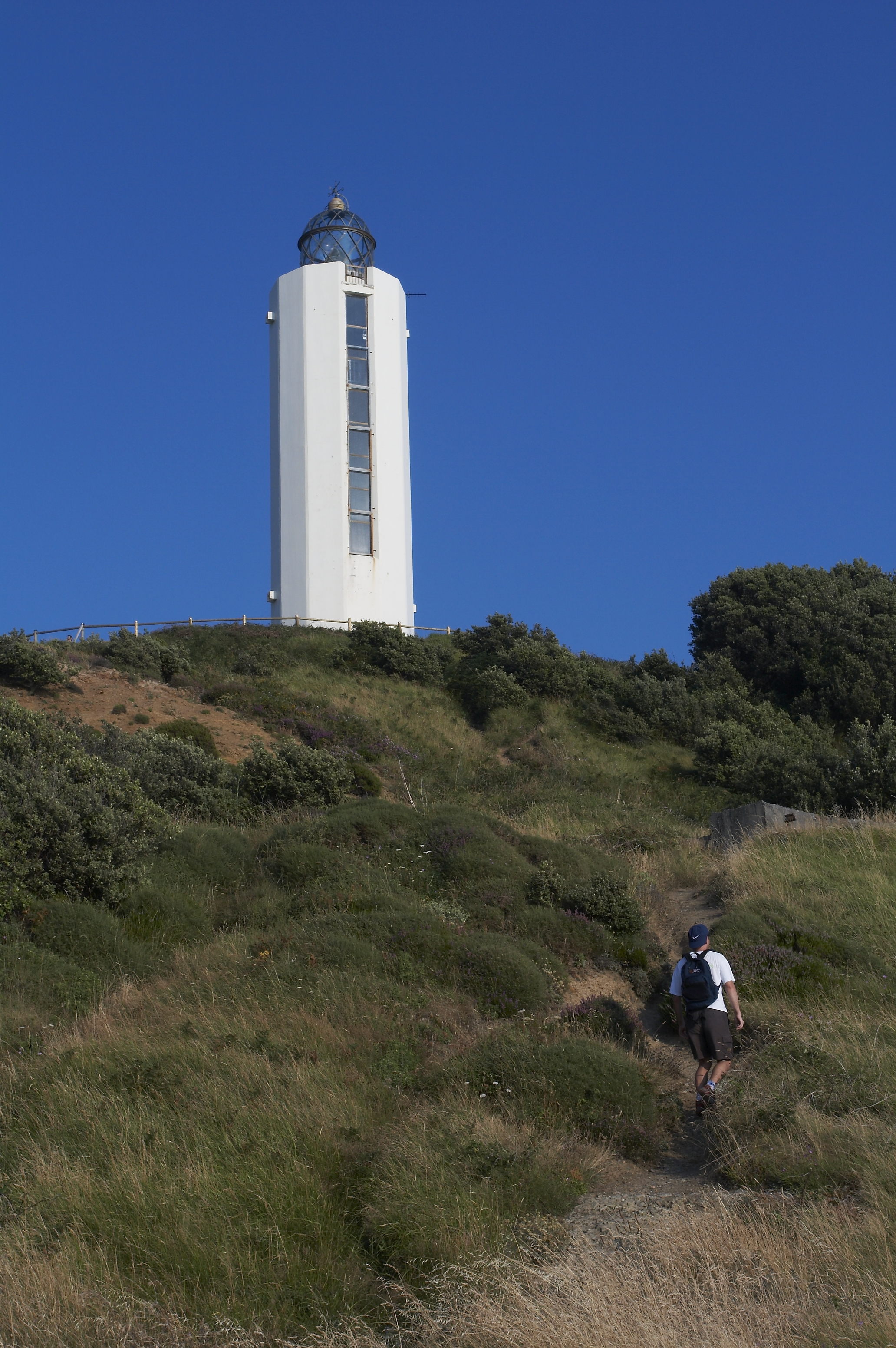 Gorlizko (Bizkaia) itsasargia, Billano lurmuturrean kokaturik dagoena